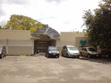 Frente del decanato, de la Facultad Experimental de Ciencias y Tecnología de la Universidad de Carabobo.